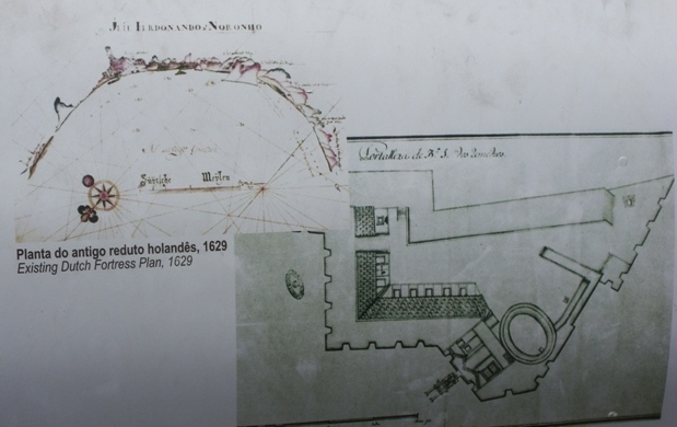 Placa com a comparação entre as plantas do primitivo forte neerlandês e o português, esta última de autoria de José Fernandes Portugal (1798).